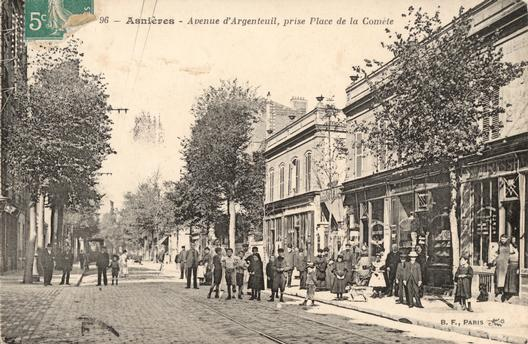 Asnieres-sur-Seine: Avenue d'Argenteuil et place de la Comète